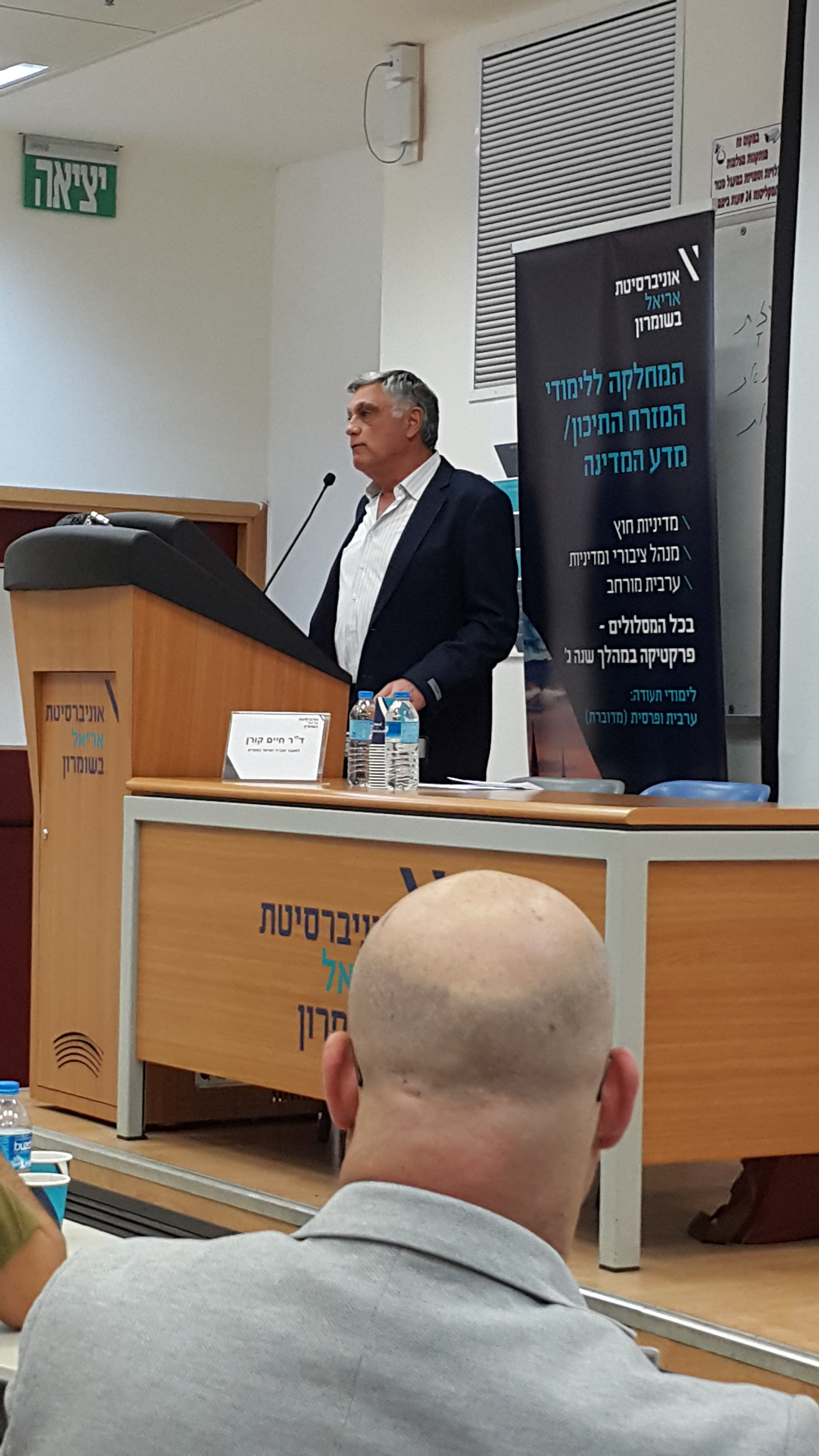 ד"ר חיים קורן